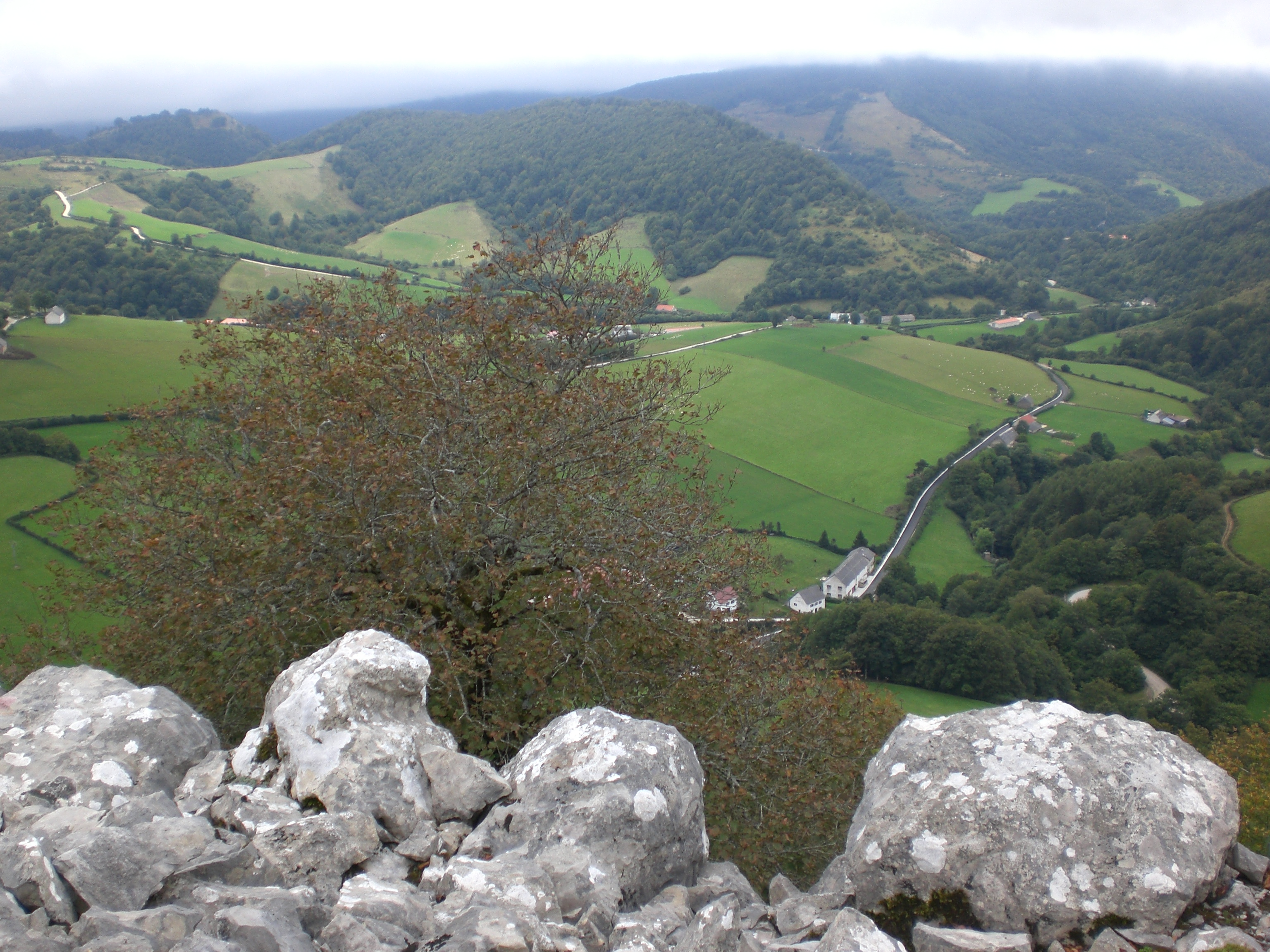 Arlekiako gazteluko argazkia